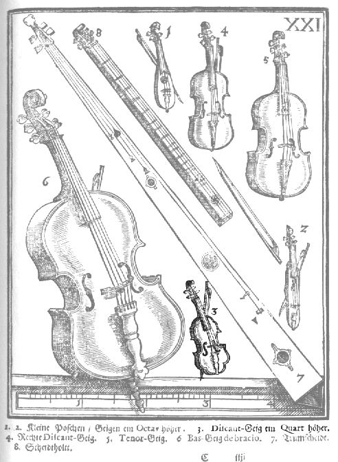 Geigenfamilie mit Diskantgeige oder auch Violino piccolo. Unter anderem: Pochette (hier bezeichnet als „kleines Poschen“).